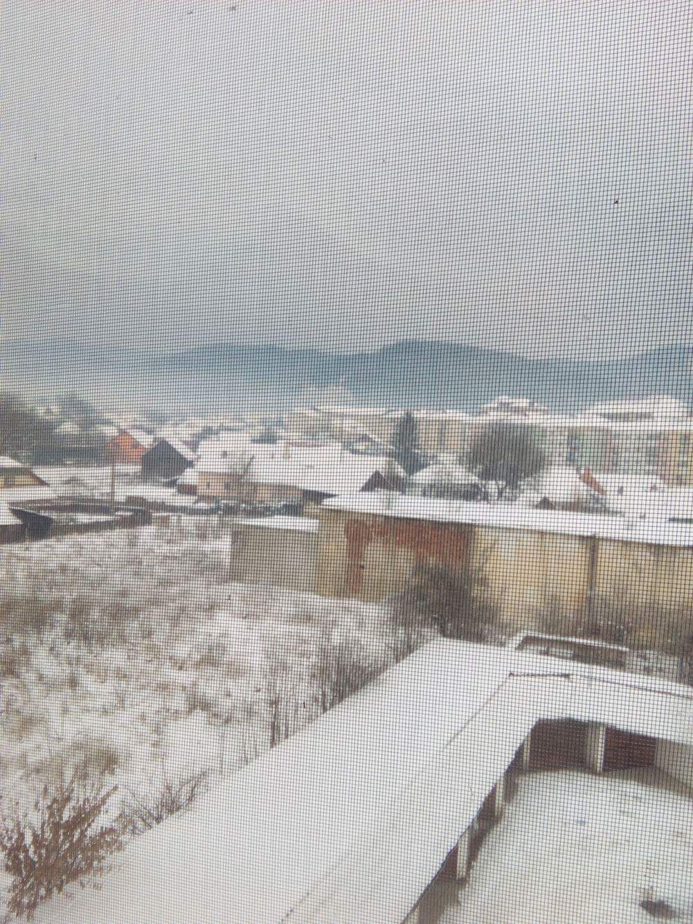 Kovászna látképe háttérben a Kárpátokkal